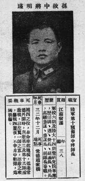 中文（台灣）: 抗戰軍人忠烈錄第一輯中的烈士遺像